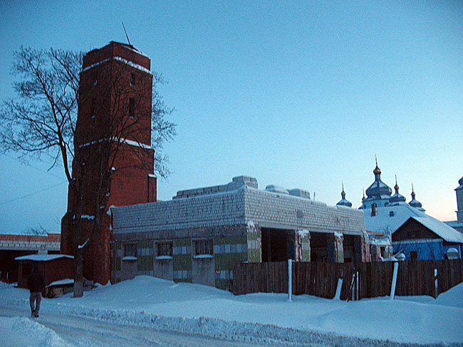 Добруш. Пажарная частка